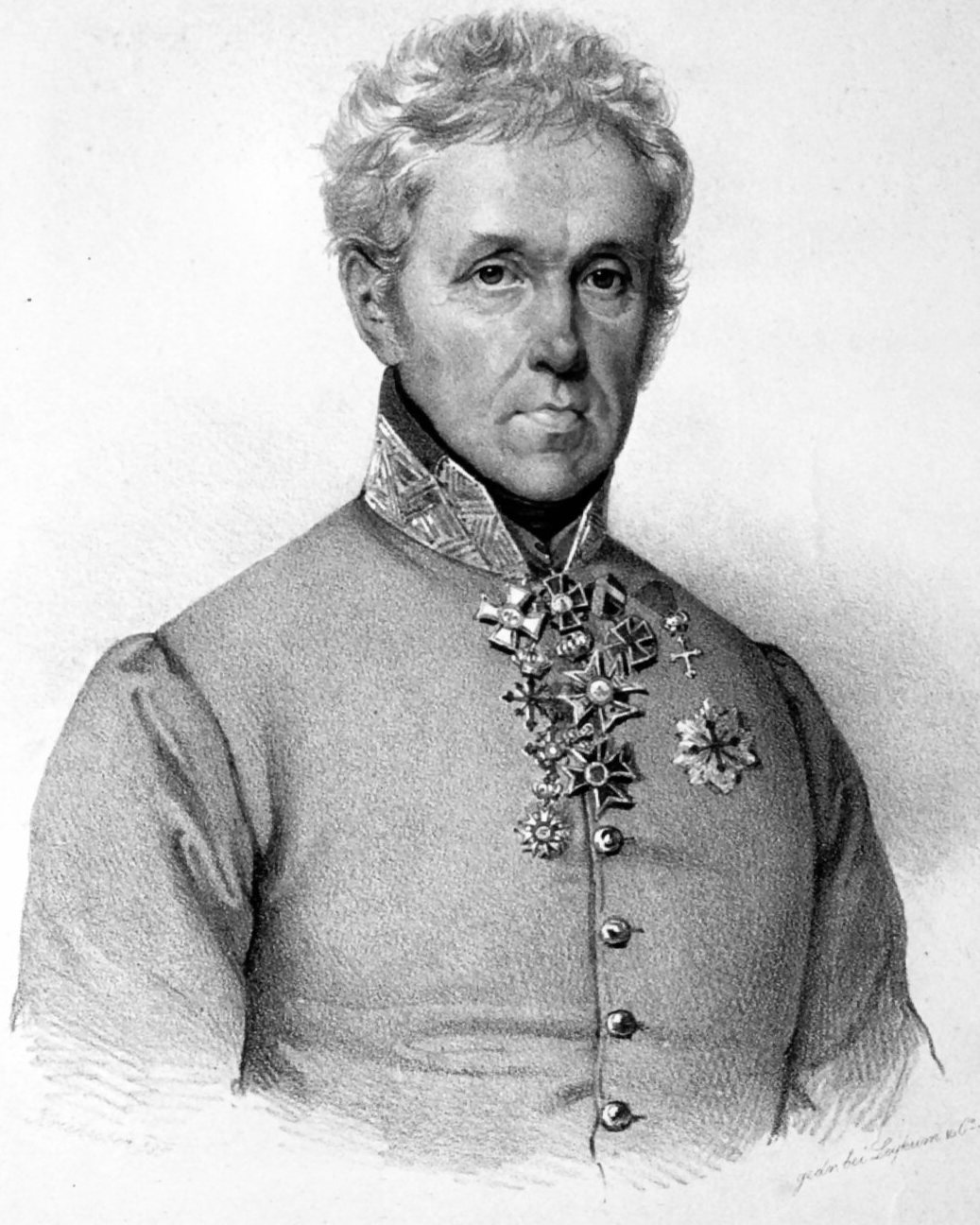 Franz von Scholl, Austrian general